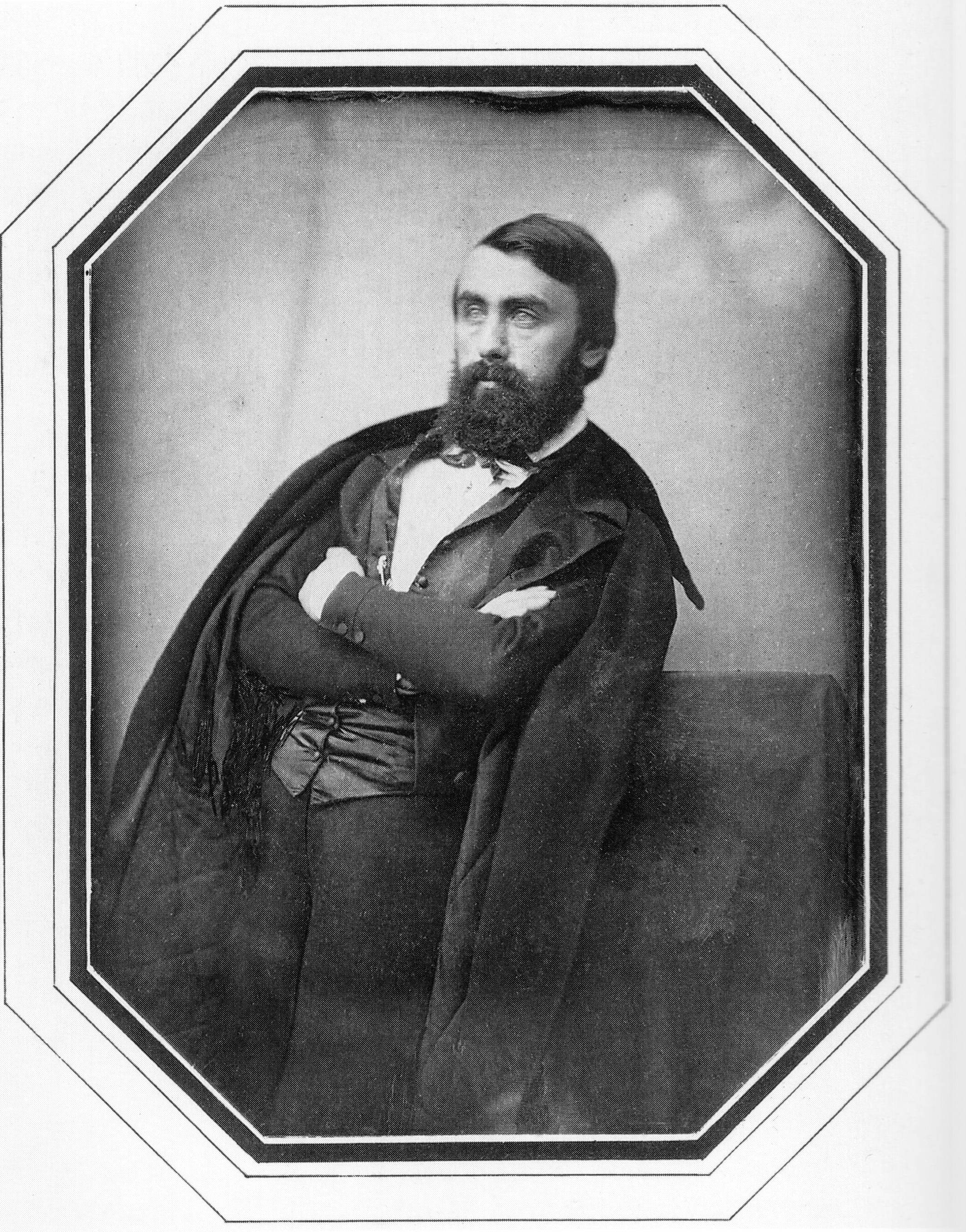 Daguerreotypie, Jacob Seib, Philipp Winterwerb, 1848. Ludwig Simon, Abgeordneter der Frankfurter Nationalversammlung